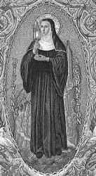 Santa Juliana de Lieja Bélgica, 1193; murió en Fosses el 5 de abril de 1258